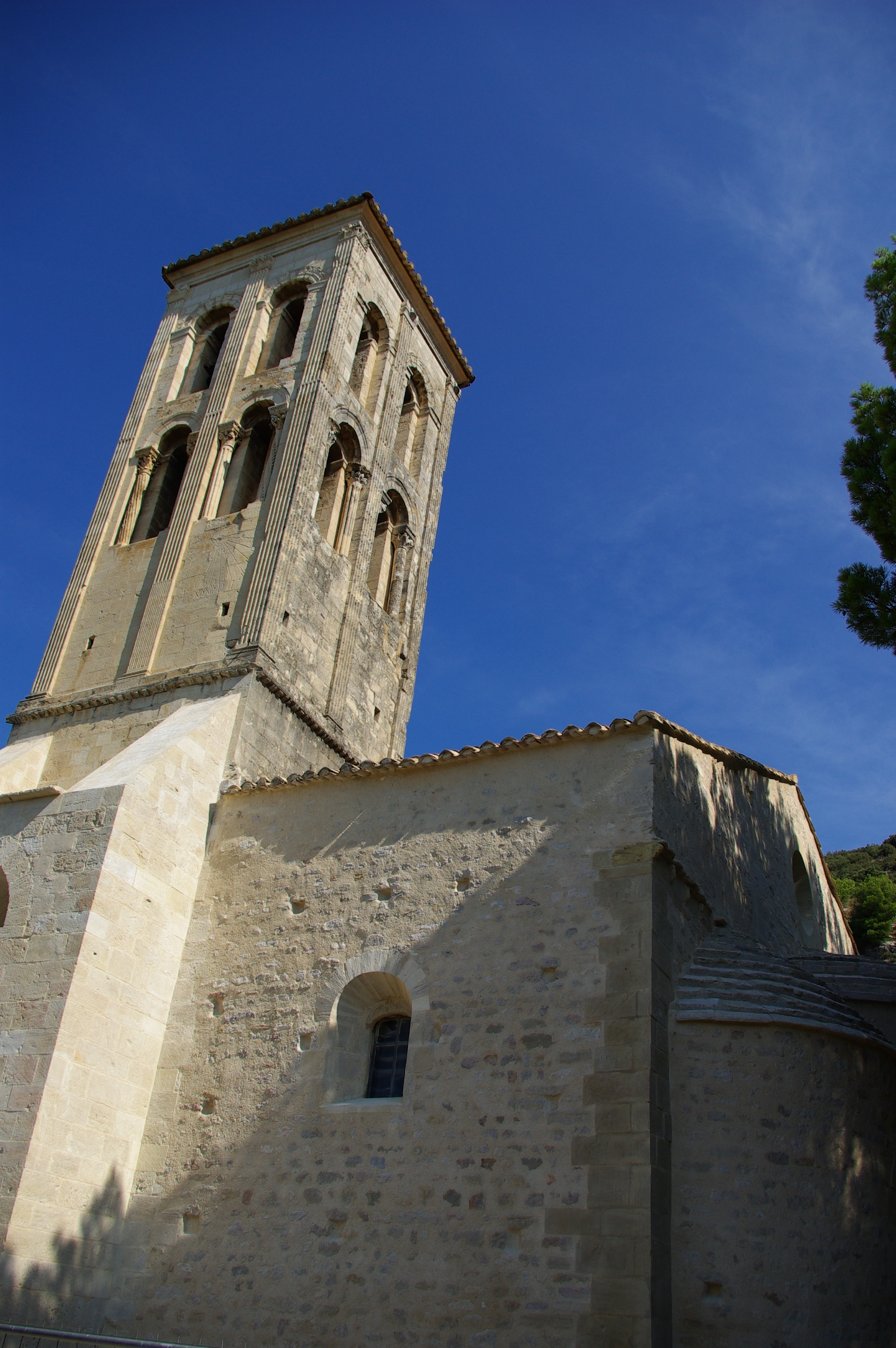 Notre Dame d'Aubune à Beaumes-de-Venise